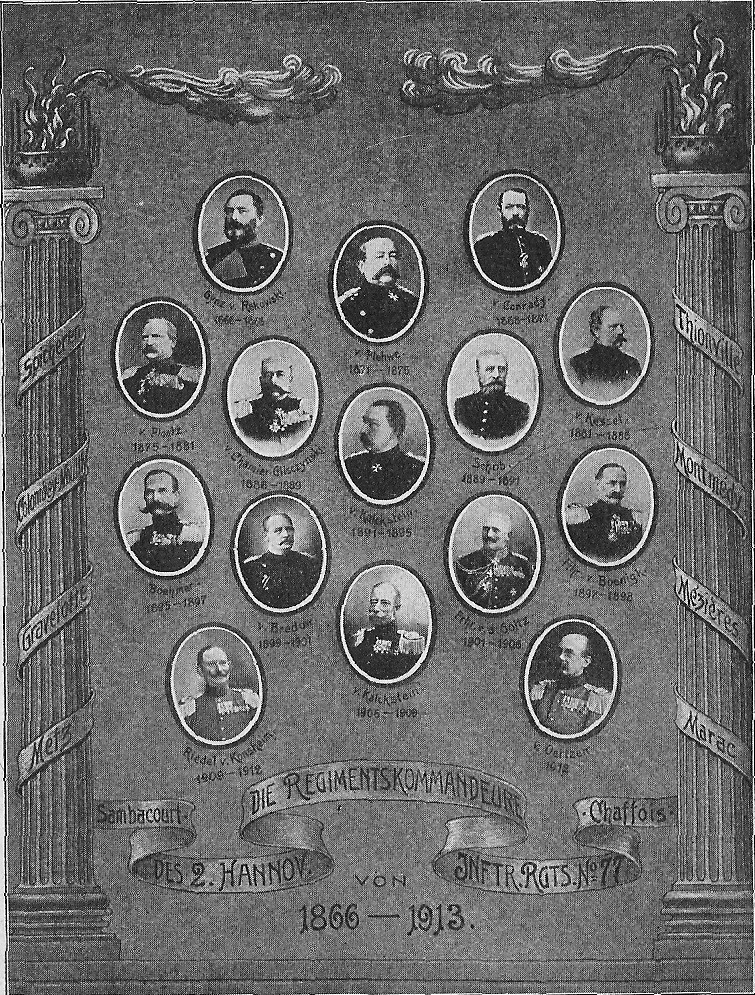 Die Regimentskommandeure des 2. Hannoverschen Infanterie-Regiments Nr. 77, 1866-1913